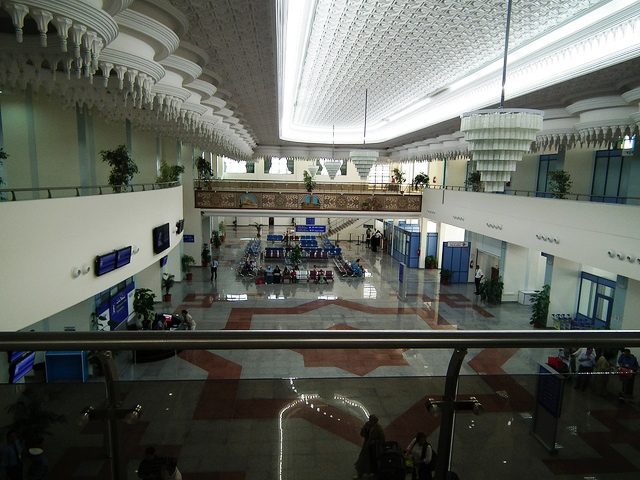 Intérieur de l’aéroport de Tlemcen